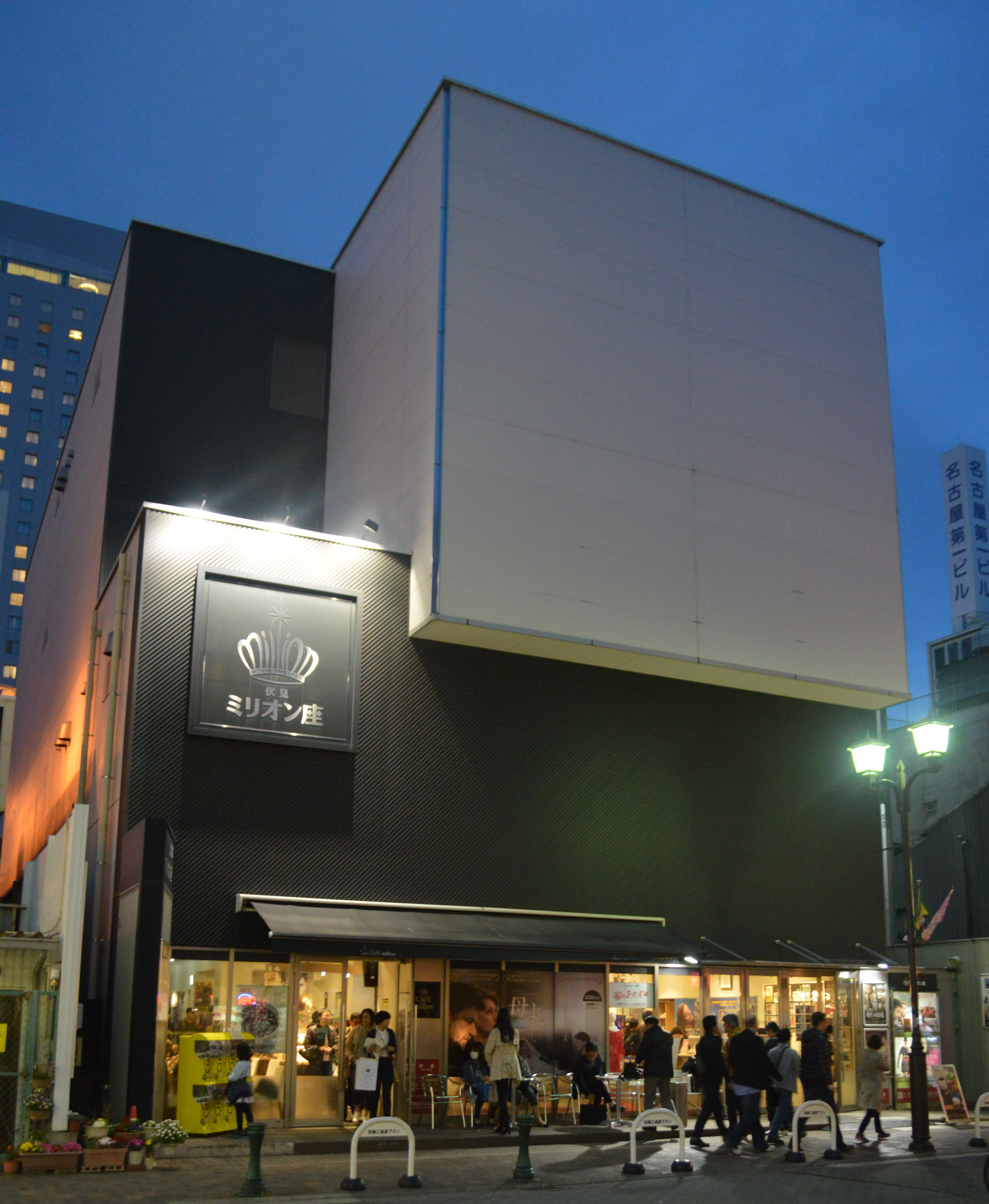 名古屋市中区の伏見にある映画館「伏見ミリオン座」。